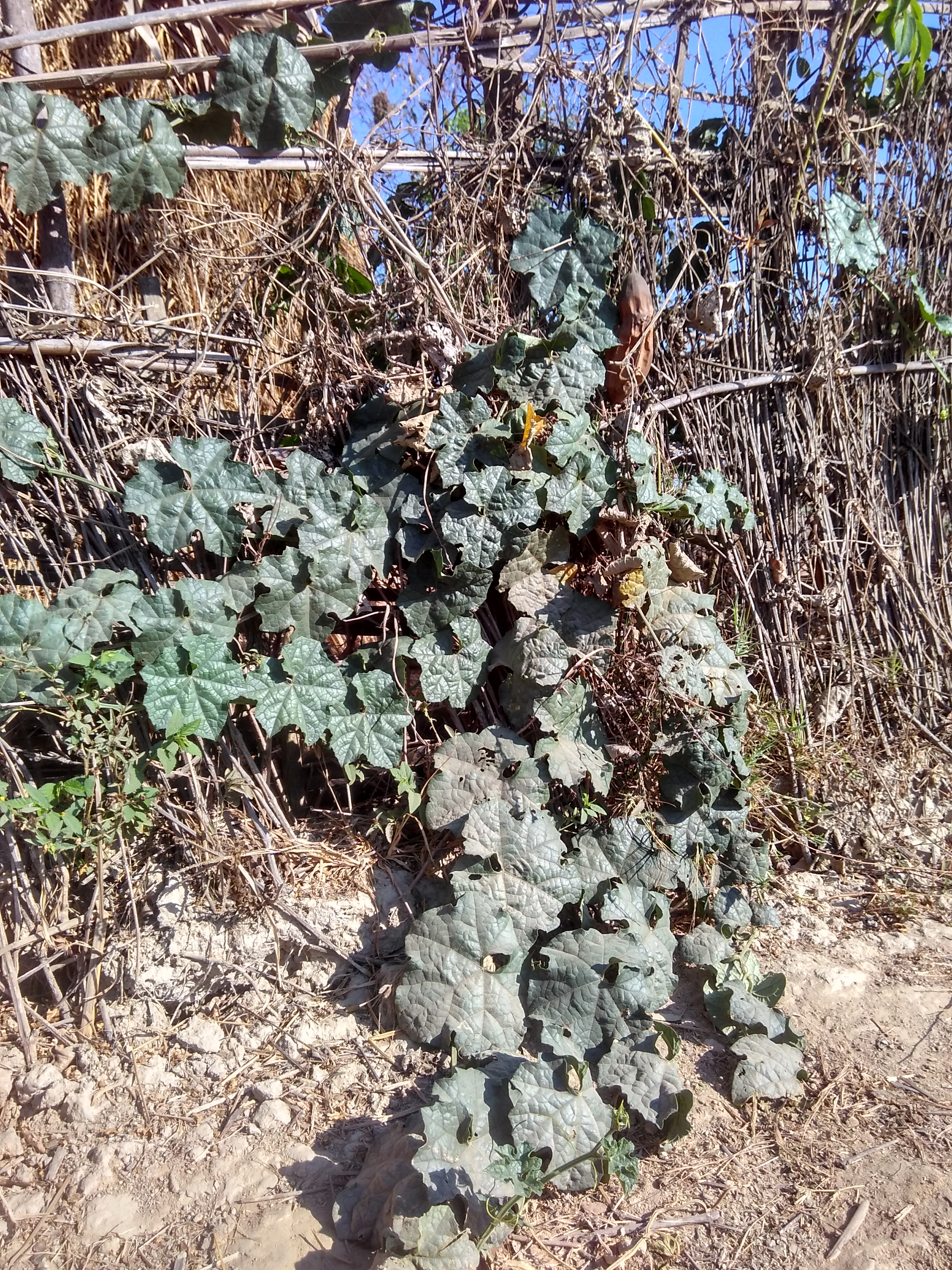 မြန်မာဘာသာ: ခြံစည်းရိုးကို တွယ်ကပ်နေသော သပွတ်ပင်